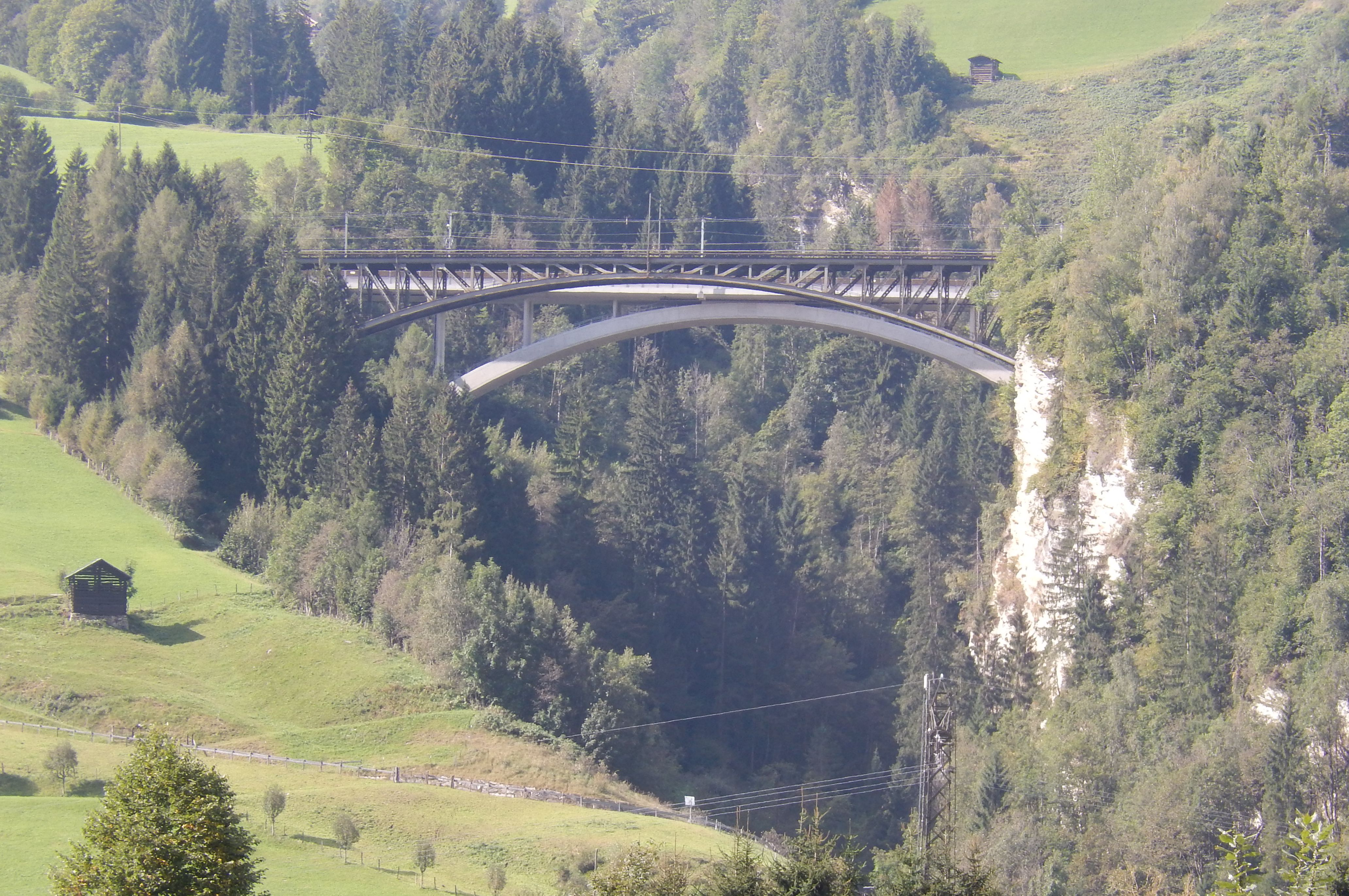 Angerschluchtbrücken der Tauernbahn, September 2016